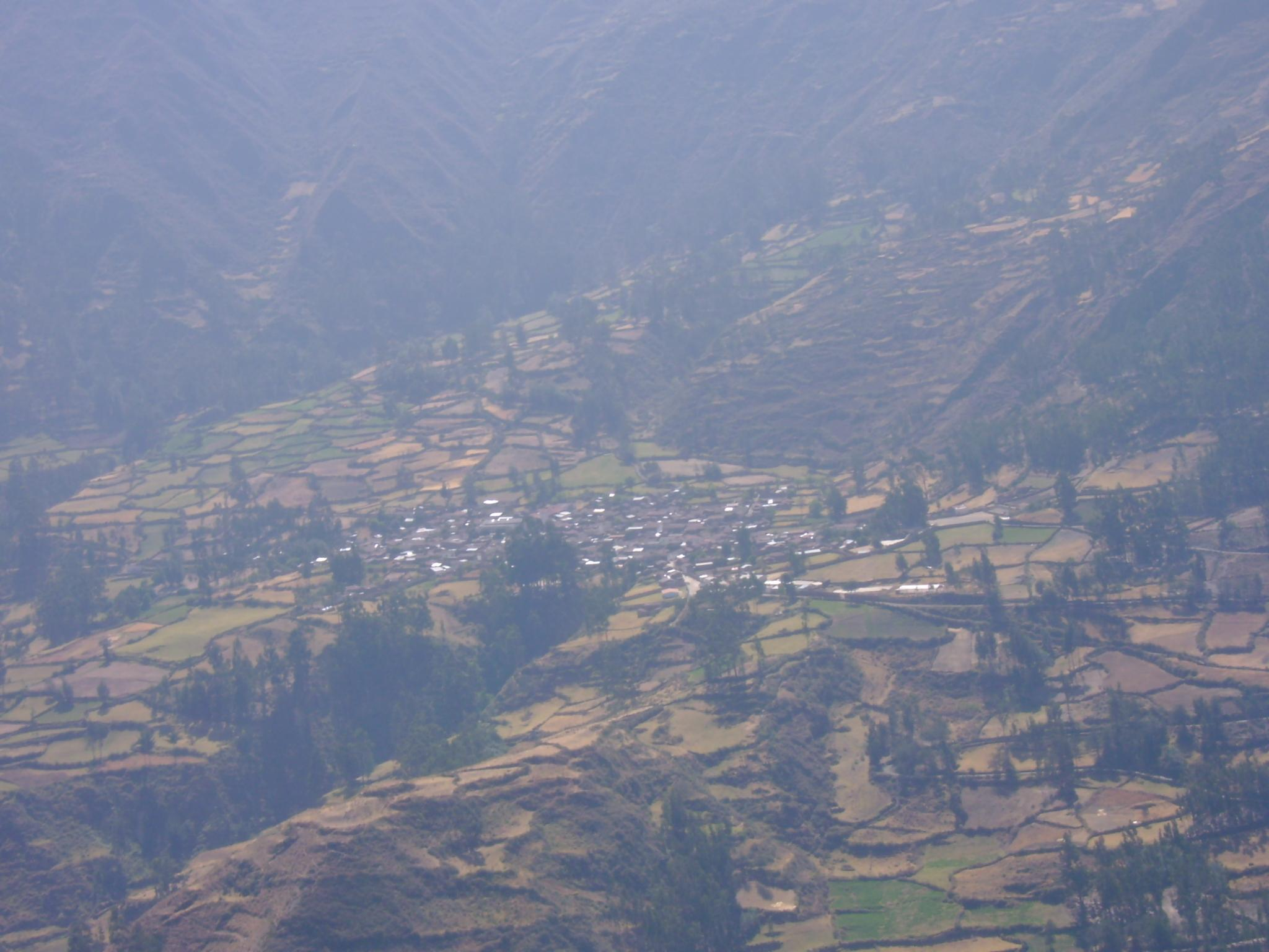 Poblado de Huasta.